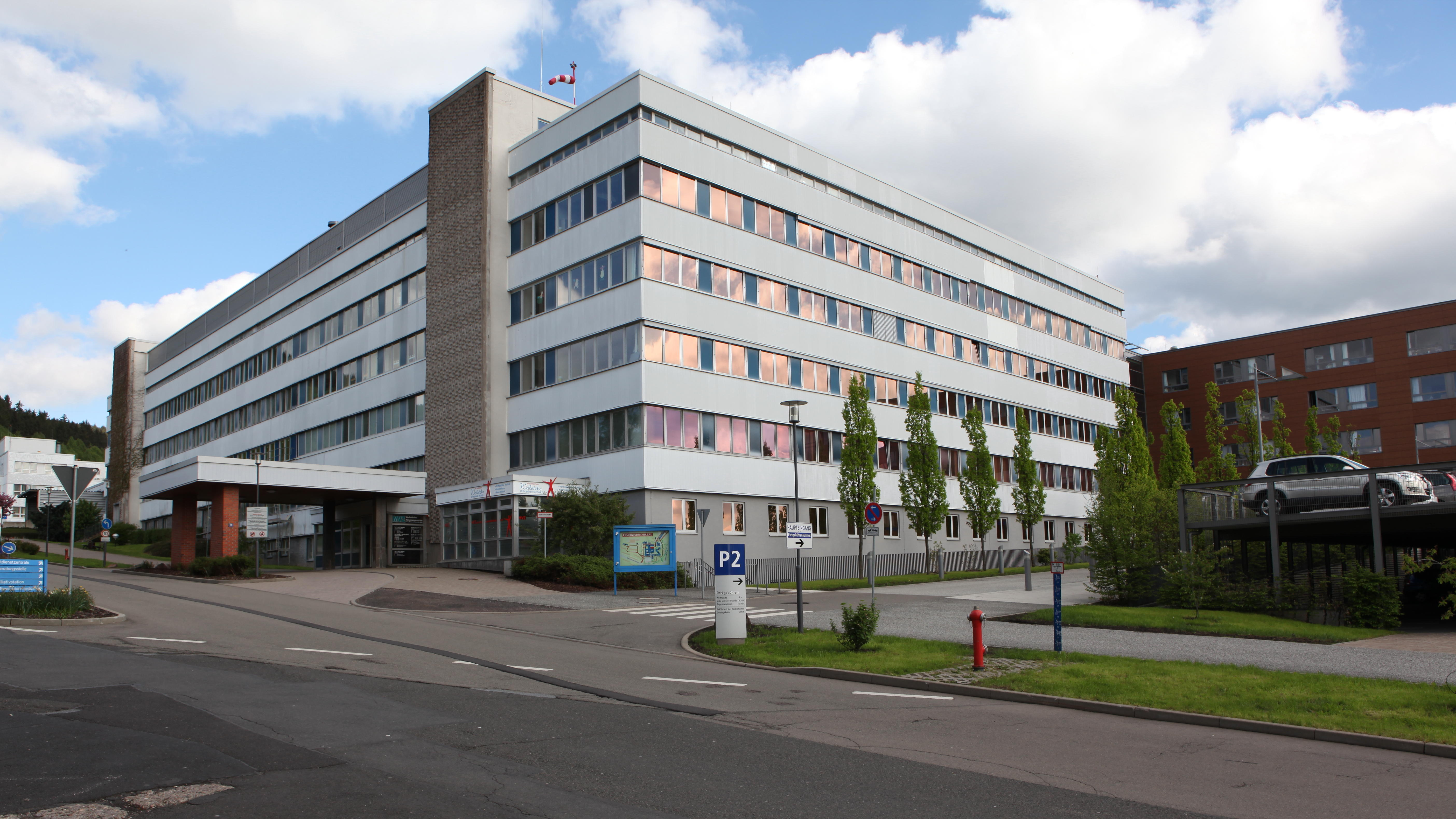 Zentralklinikum Suhl